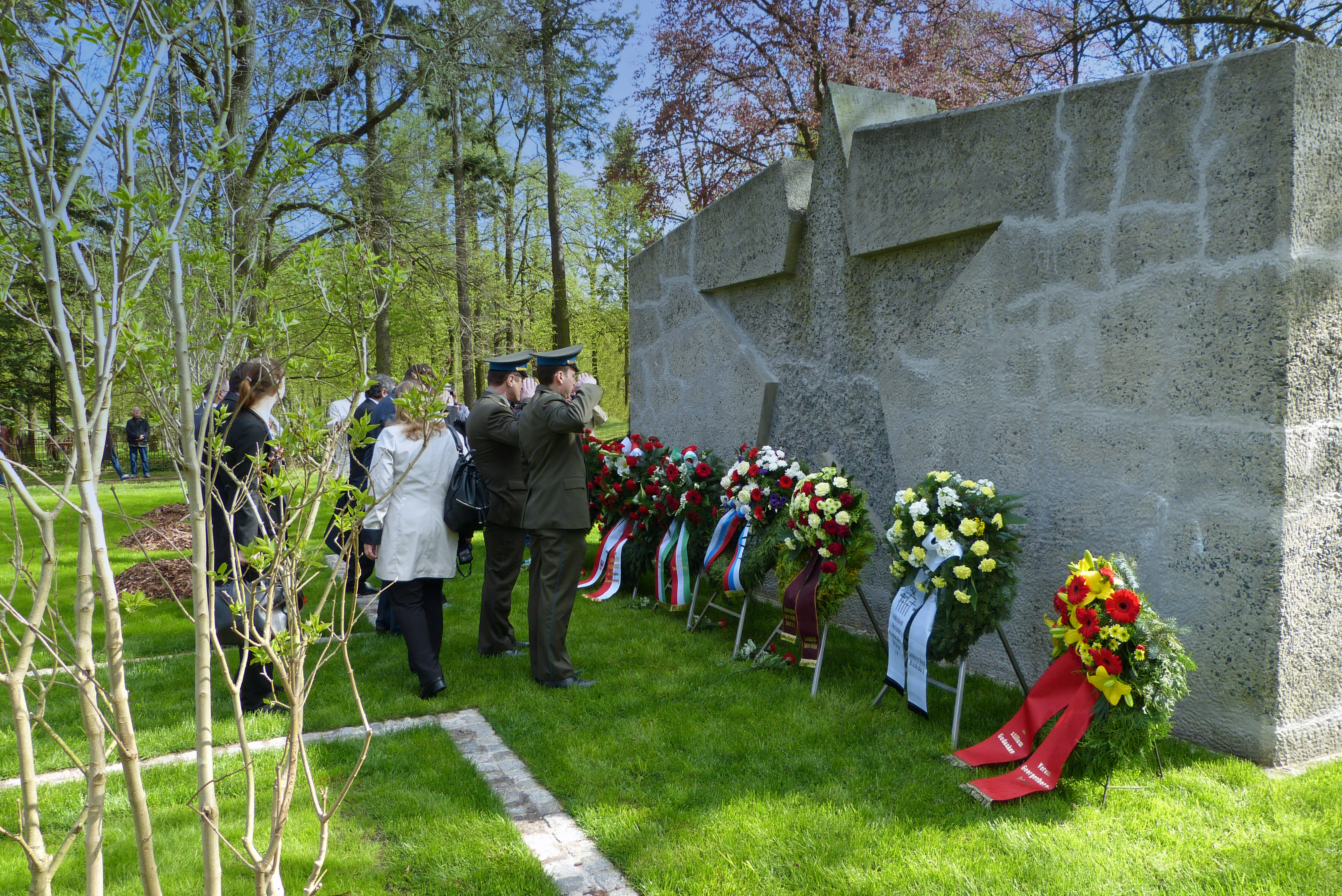 Einweihung des komplett umgestalteten russischen Soldatenfriedhof auf dem Georgenberg in Spremberg im April 2016